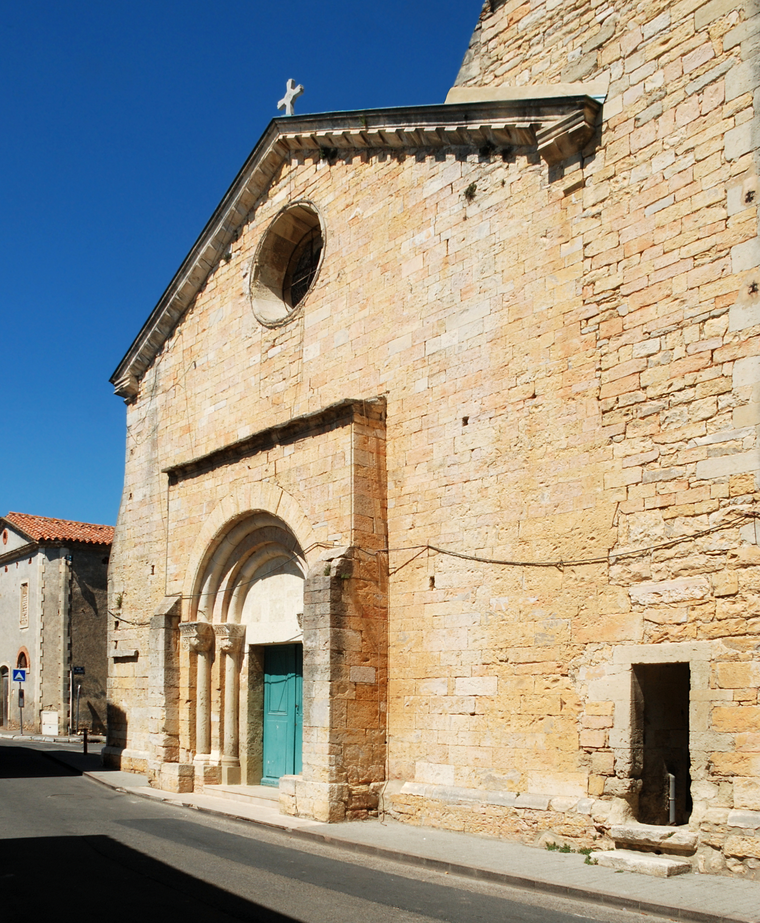 France - Gard - Église Saint-André de Bernis